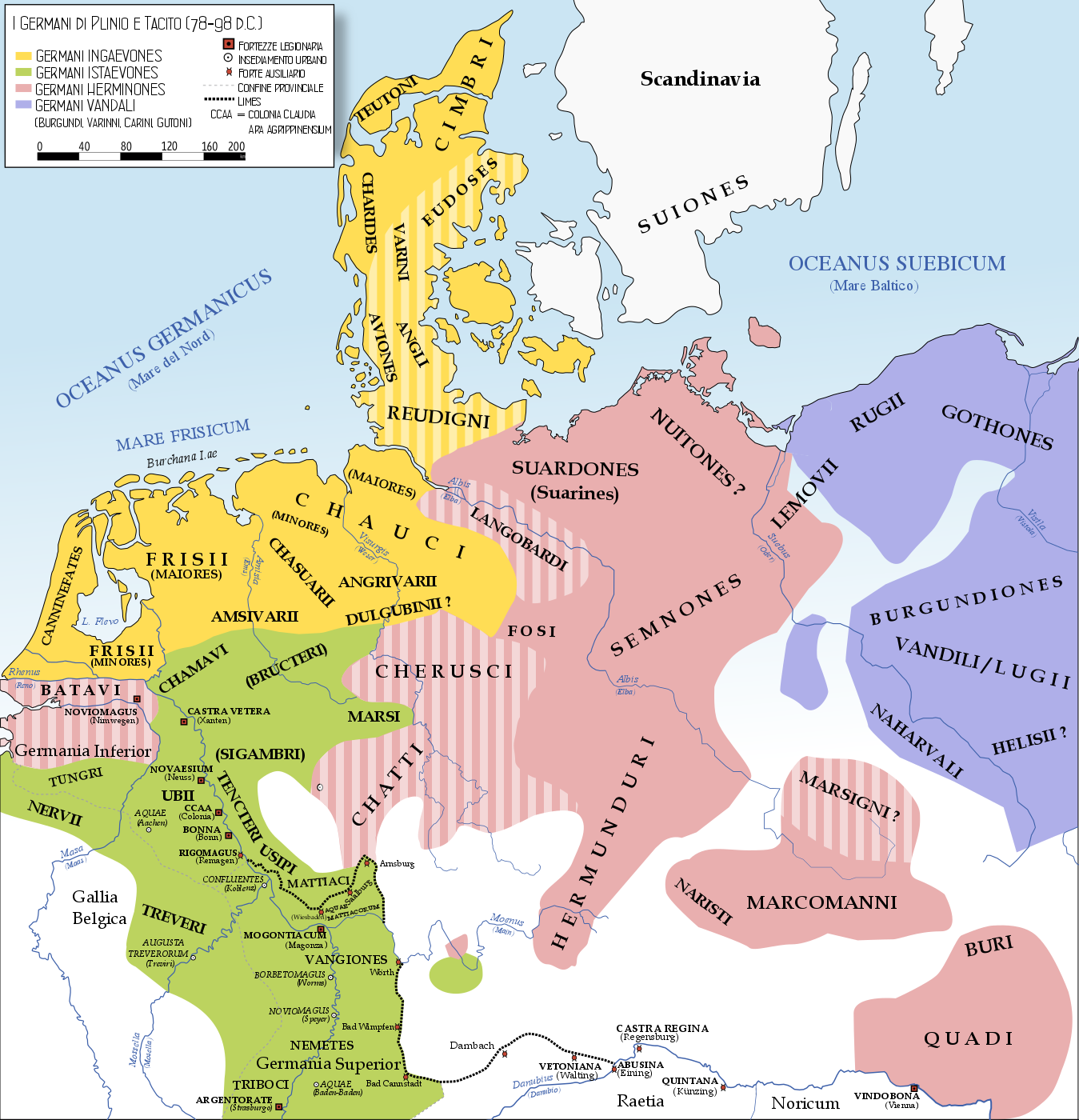 La Germania e le sue divisioni interne (Ingaevones, 'Istaevones e Herminones) degli storici antichi Plinio (Naturalis Historia) e Tacito (Germania), databile pertanto al 78-98 d.C. (Vespasiano-Traiano), This file was derived from: GermansAD50.svg Ziegelbrenner